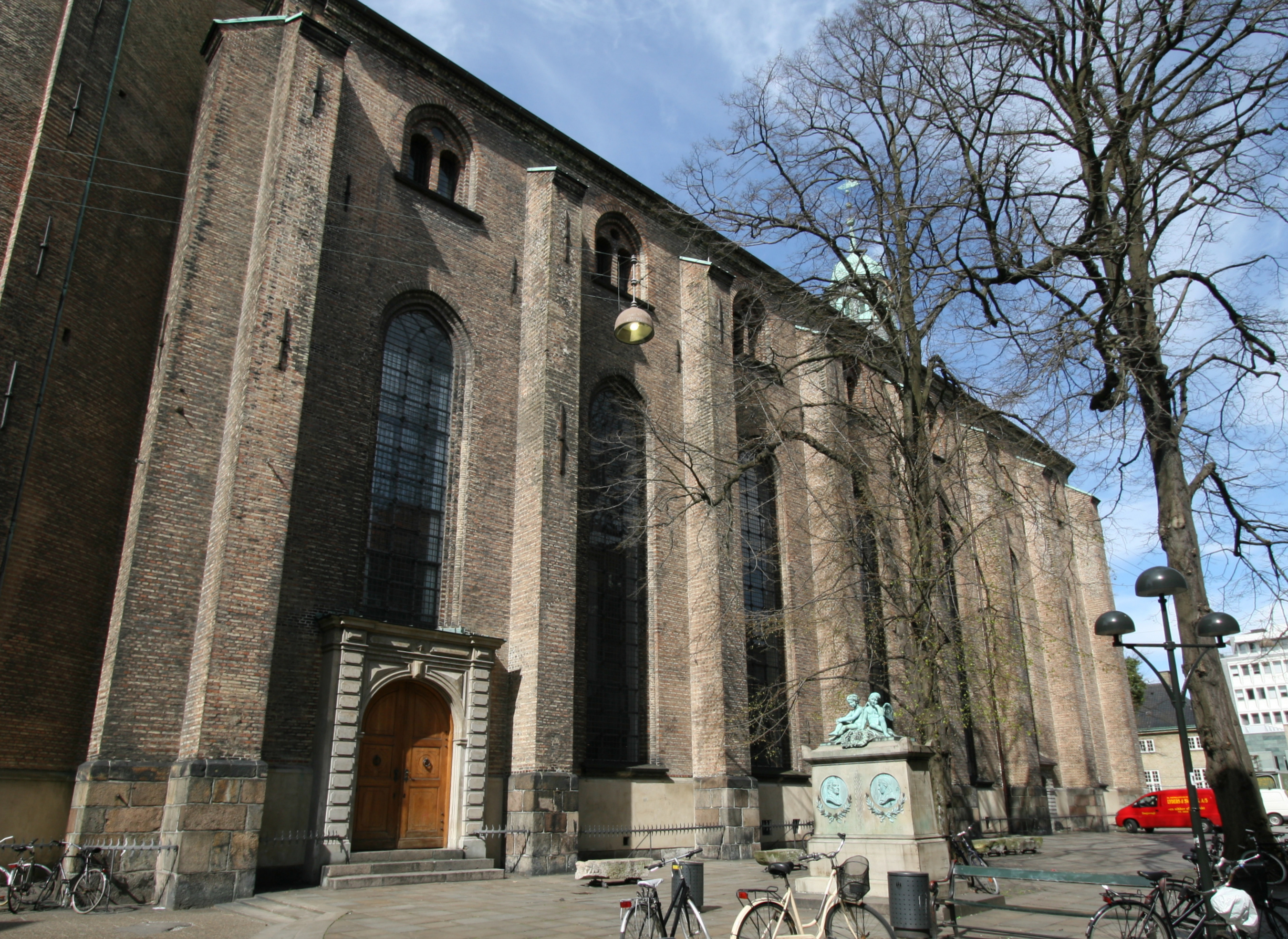 Trinitatis Kirke, Copenhagen, Denmark. Sydfacade